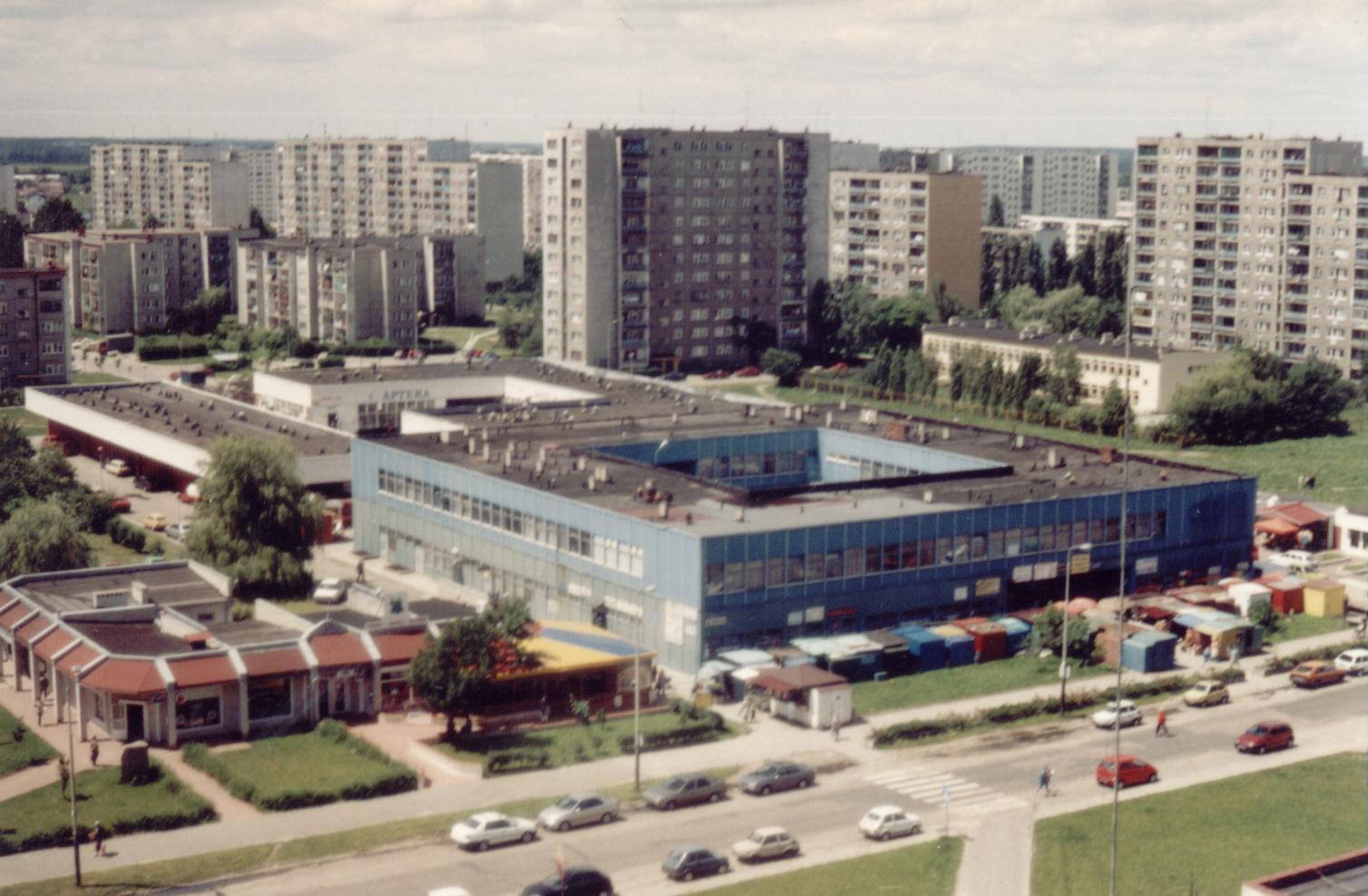 Panorama osiedla Retkinia w Łodzi; widok w kierunku północno-zachodnim View Retkinia